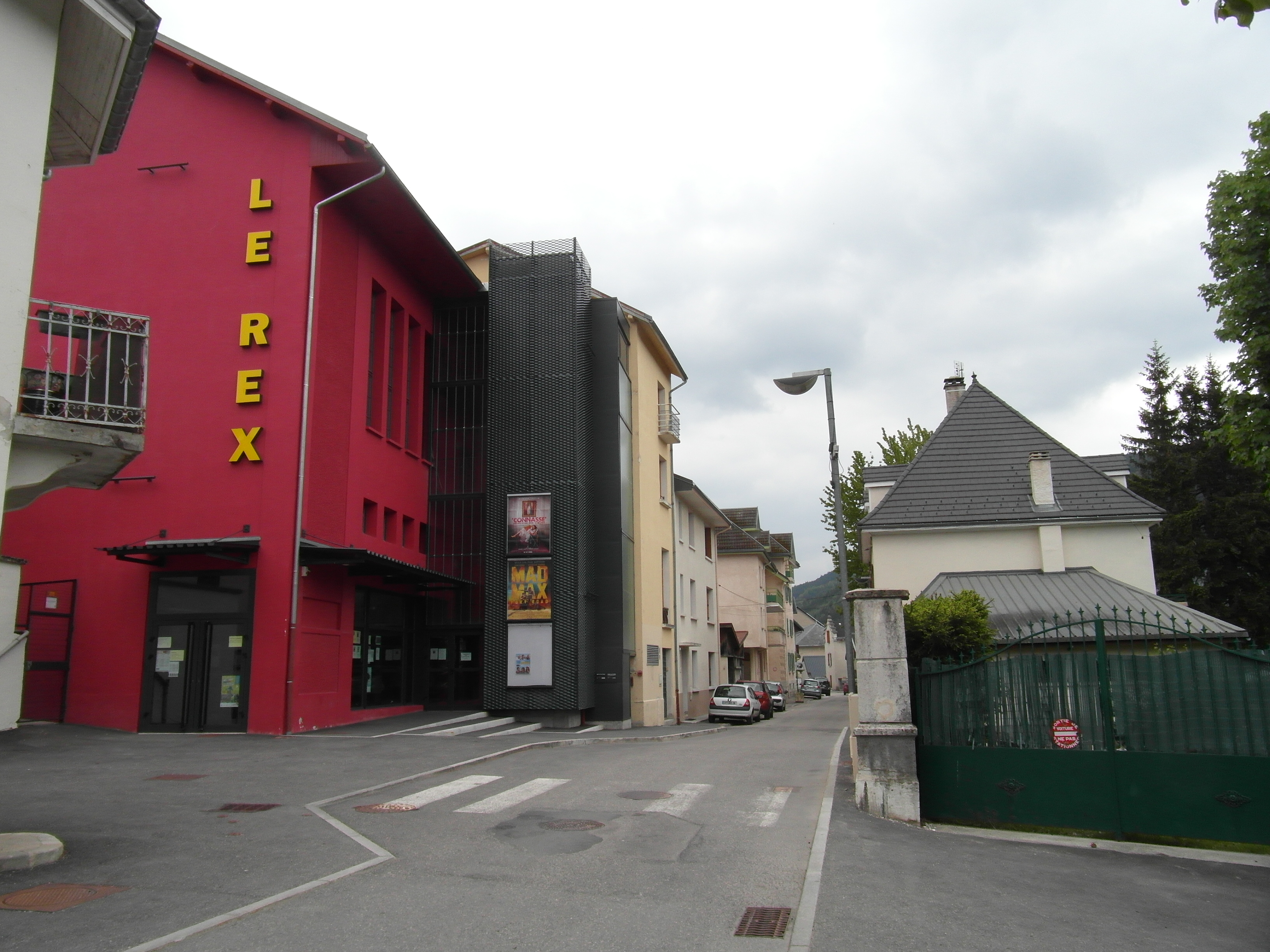 Rue du Lycée Polonais (street)